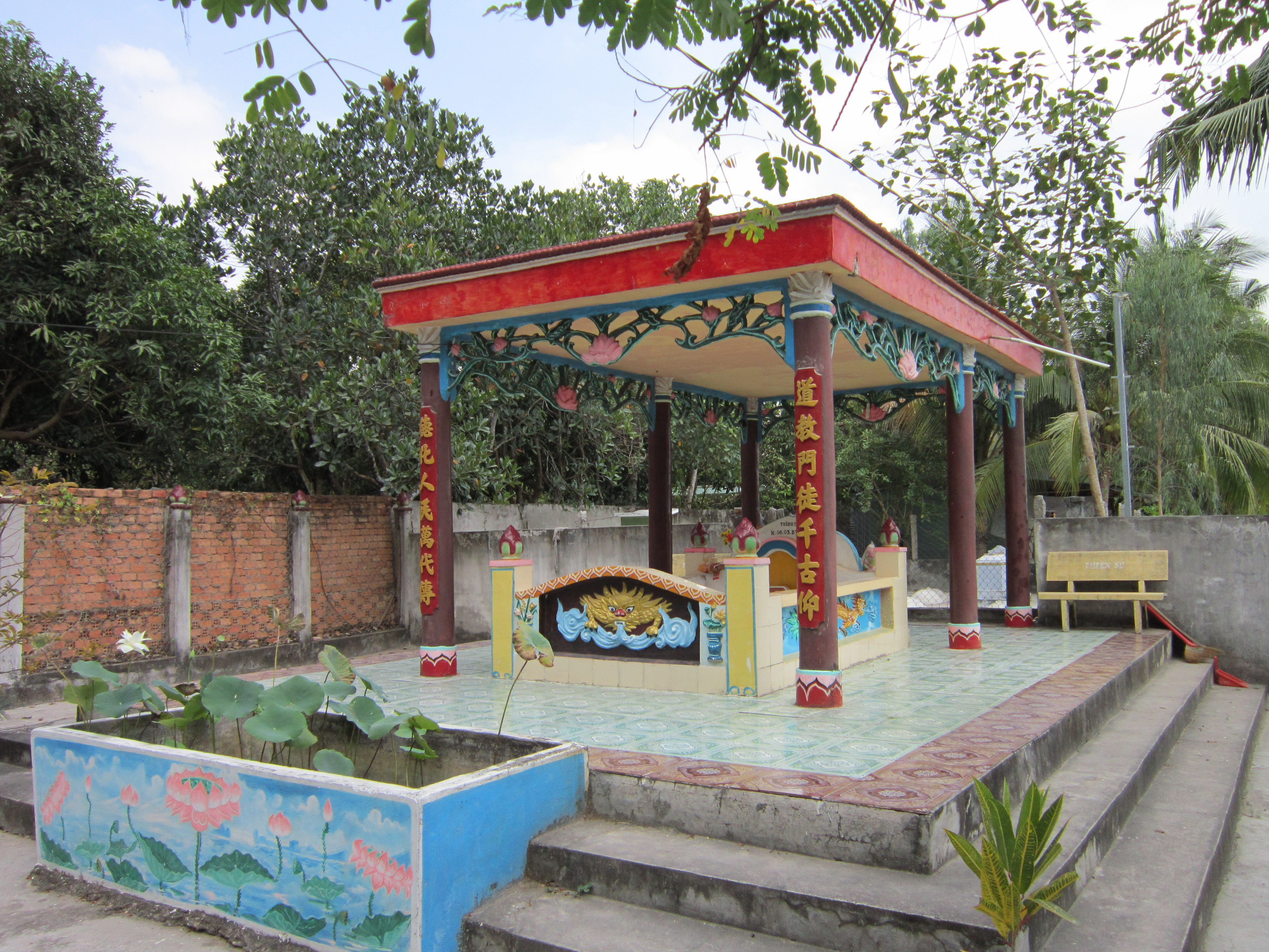 Mộ Bùi Thiền Sư (tức Tăng Chủ) tại xã Thới Sơn, huyện Tịnh Biên, tỉnh An Giang, Việt Nam.